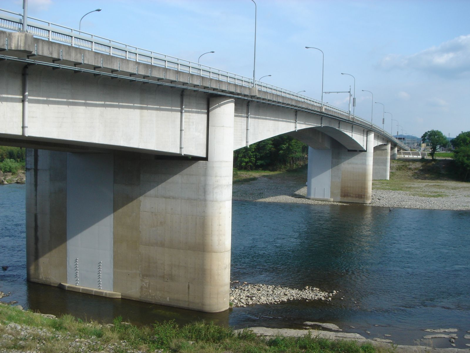 木曽川に架かる中濃大橋（美濃加茂市側の下流側より撮影）